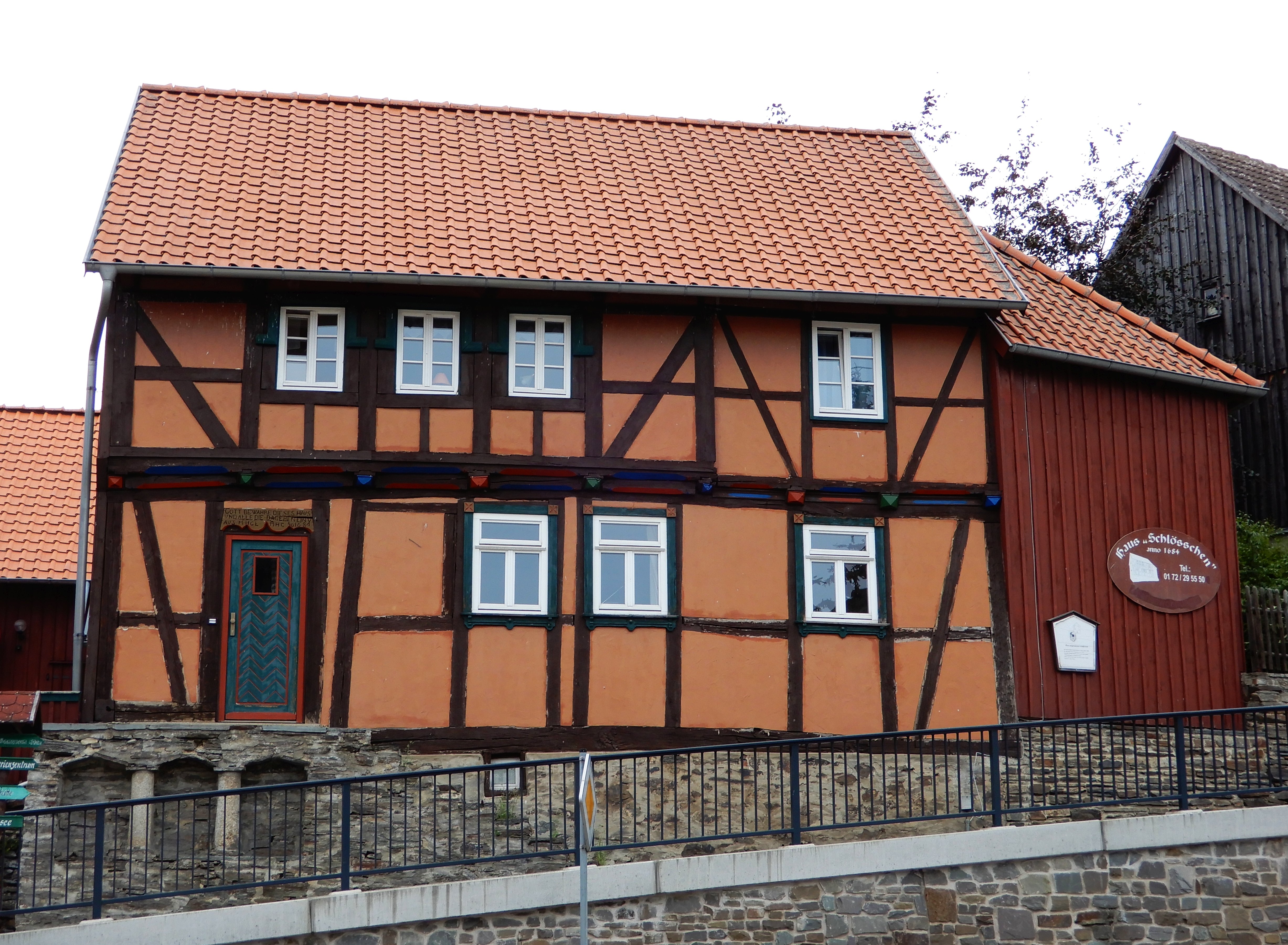 Schlösschen Neustadt 72